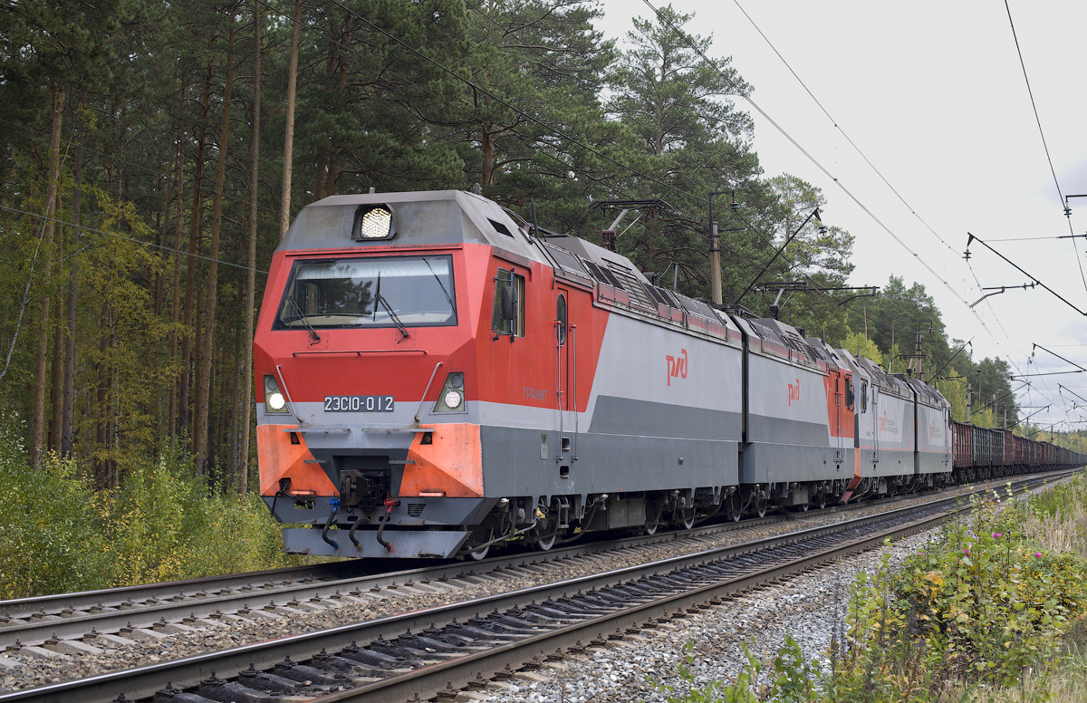 С завода поступил в депо Пермь-Сортировочная. 06.2015 — передан в депо Свердловск-Сортировочный.